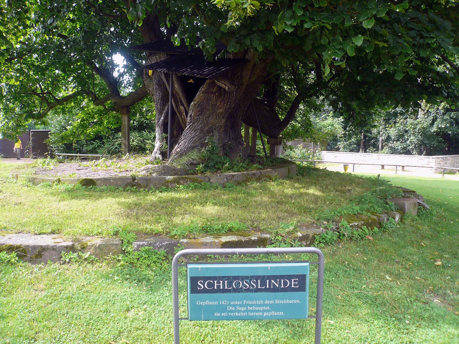 Schlosslinde Augustusburg